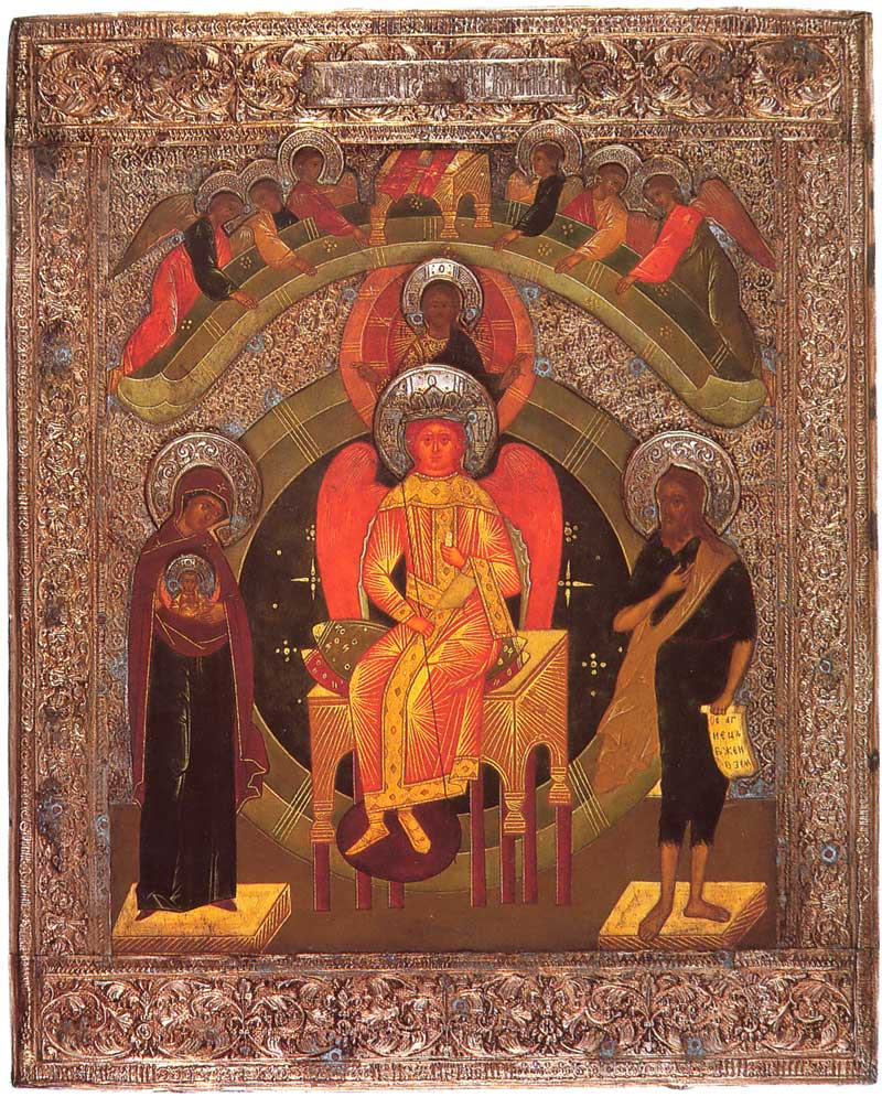 София Премудрость Божия XIX в. Государственный музей истории религии, Санкт-Петербург, Россия